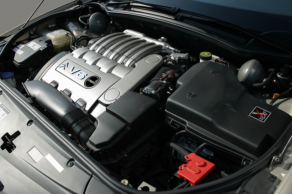 Citroën C6 V6 petrol engine